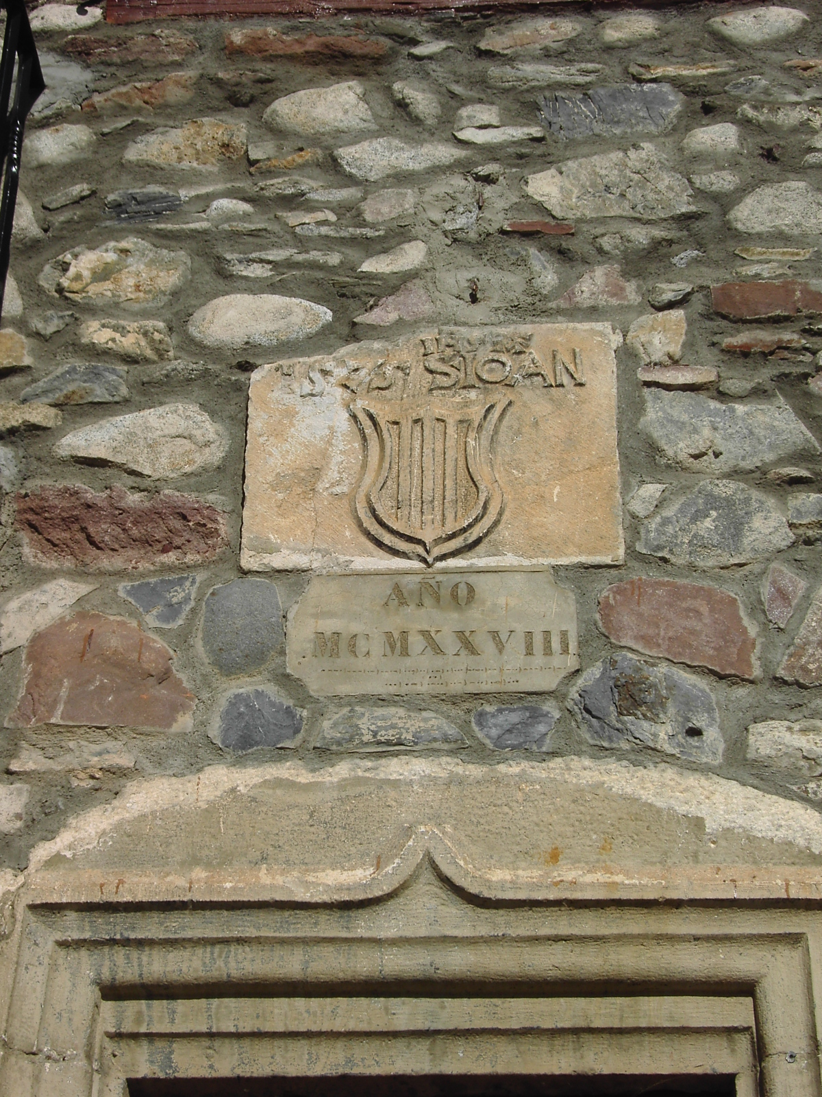 Un quairon sobre la puerta del ayuntamiento de San Juan de Plan, donde se lee "S. IOAN" en una grafía antigua. El edificio data de 1928 (como se lee debajo) así que esa piedra debe ser un añadido rescatado de alguna otra construcción del lugar.